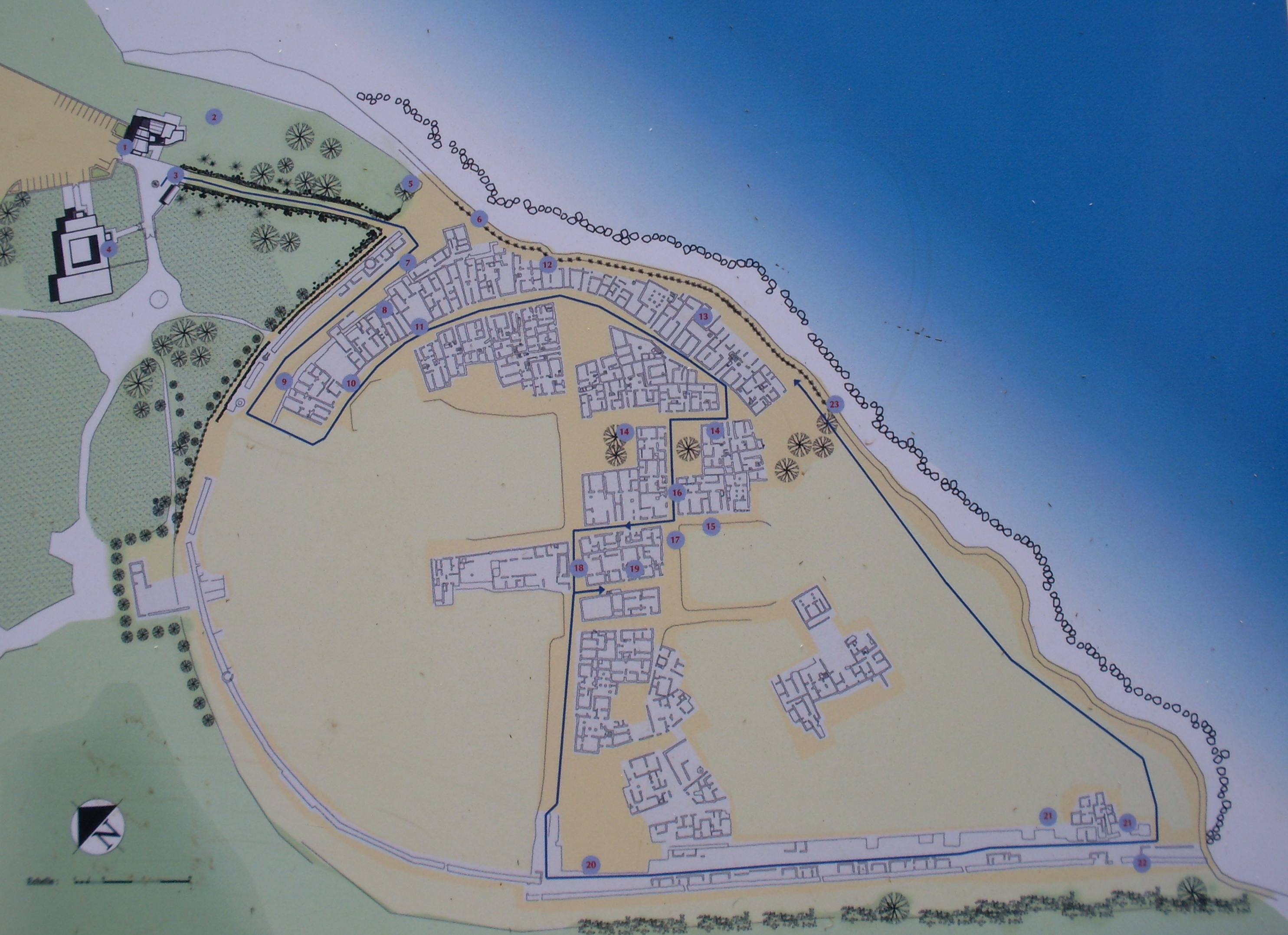 Plan du site exposé à l'entrée du musée de Kerkouane